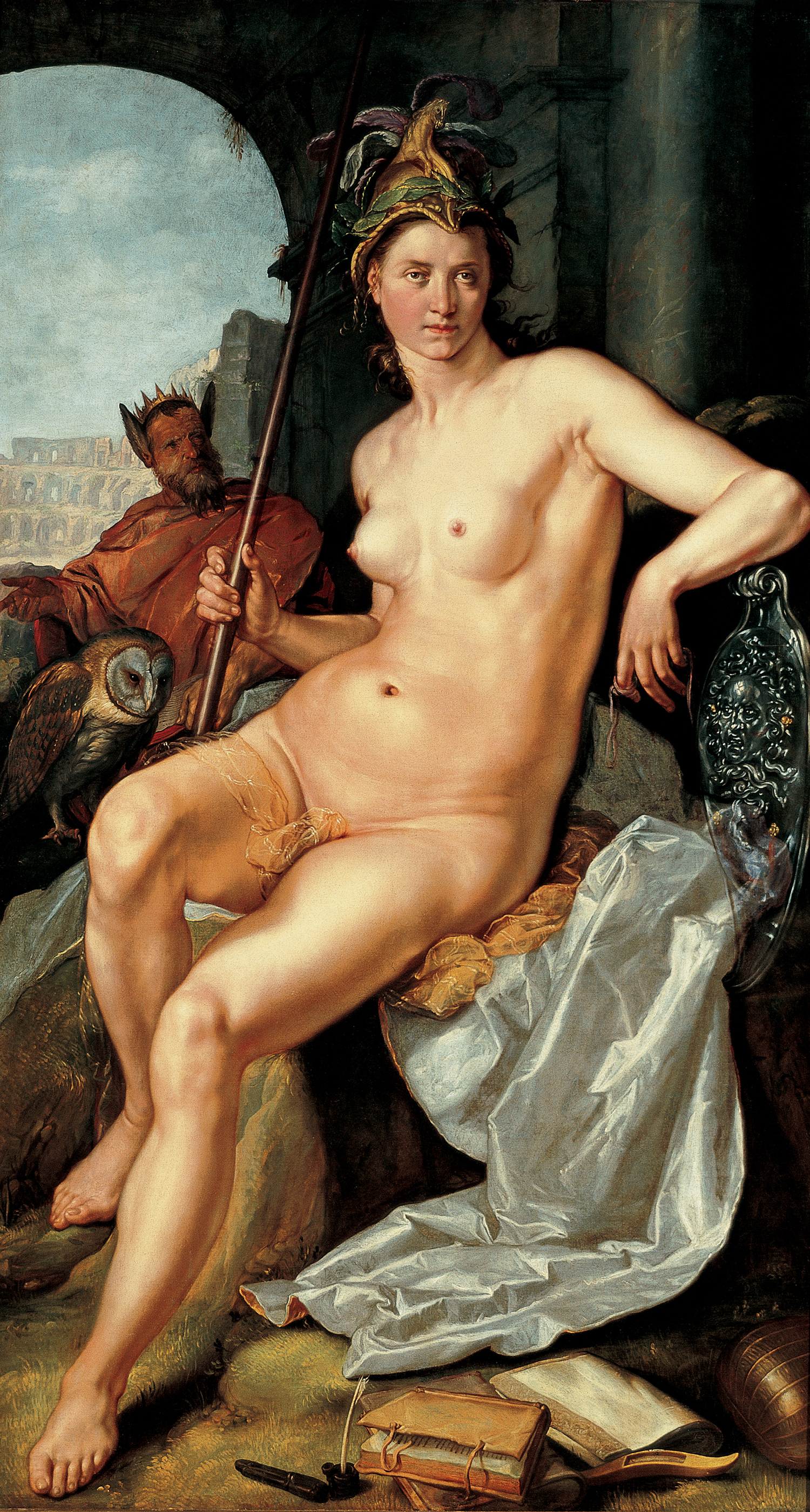 Hendrick Goltzius – Minerva Goltzius, Hendrick Mühlbracht 1558 - Haarlem 1617 Minerva 1611 doek: 214 x 120 cm